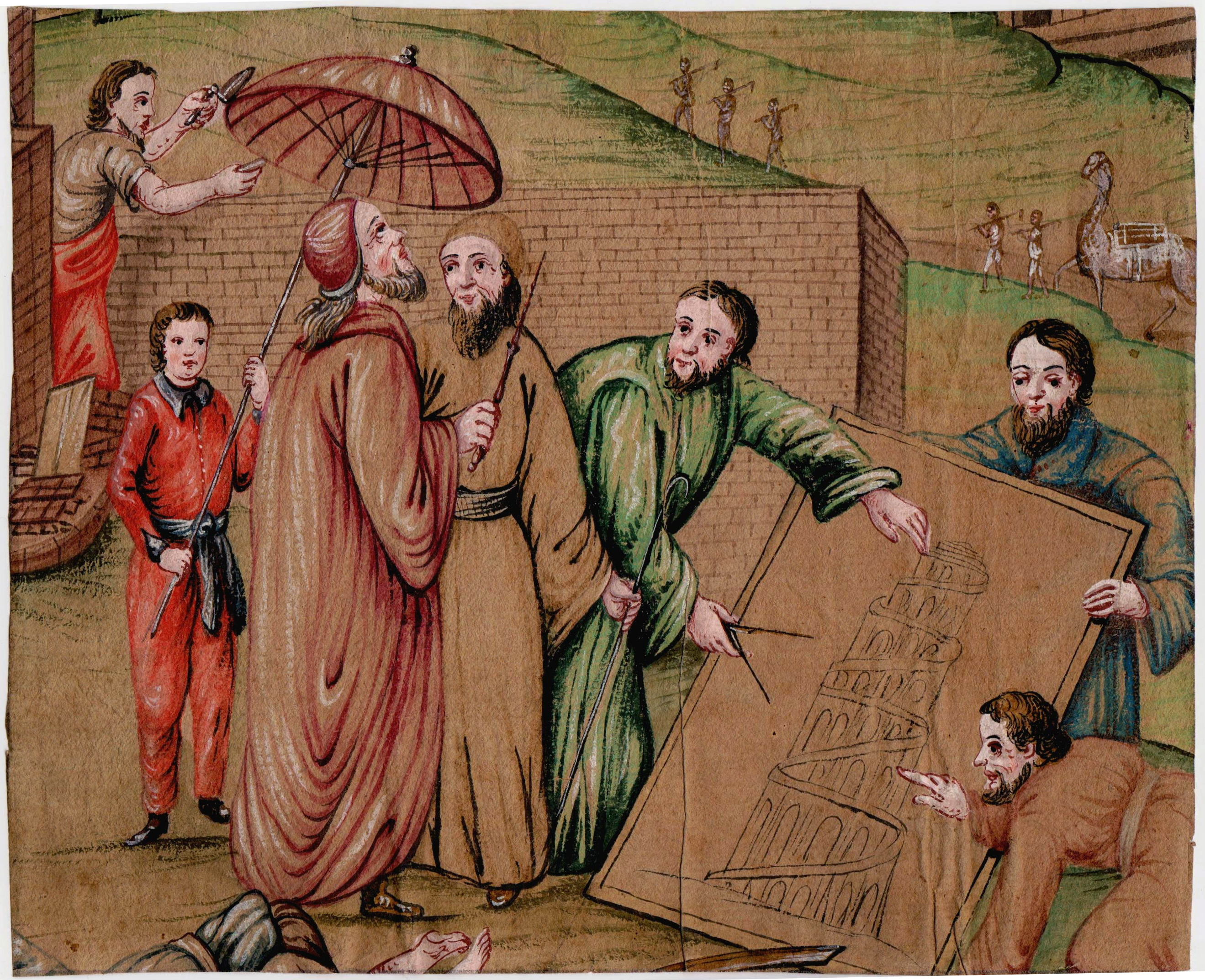 Der Turmbau zu Babel. Gouache auf Papier, um 1680–1740, wohl Italien/Süddeutsch, Feder, Tusche, Aquarell, weiß gehöht, auf bräunlichem Bütten mit Wasserzeichen; 22 x 18 cm